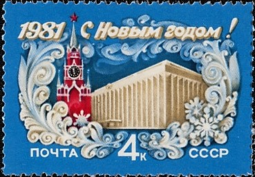 Почтовая марка СССР. 1980. Кремлёвский Дворец съездов. Номер в каталоге ЦФА 5138